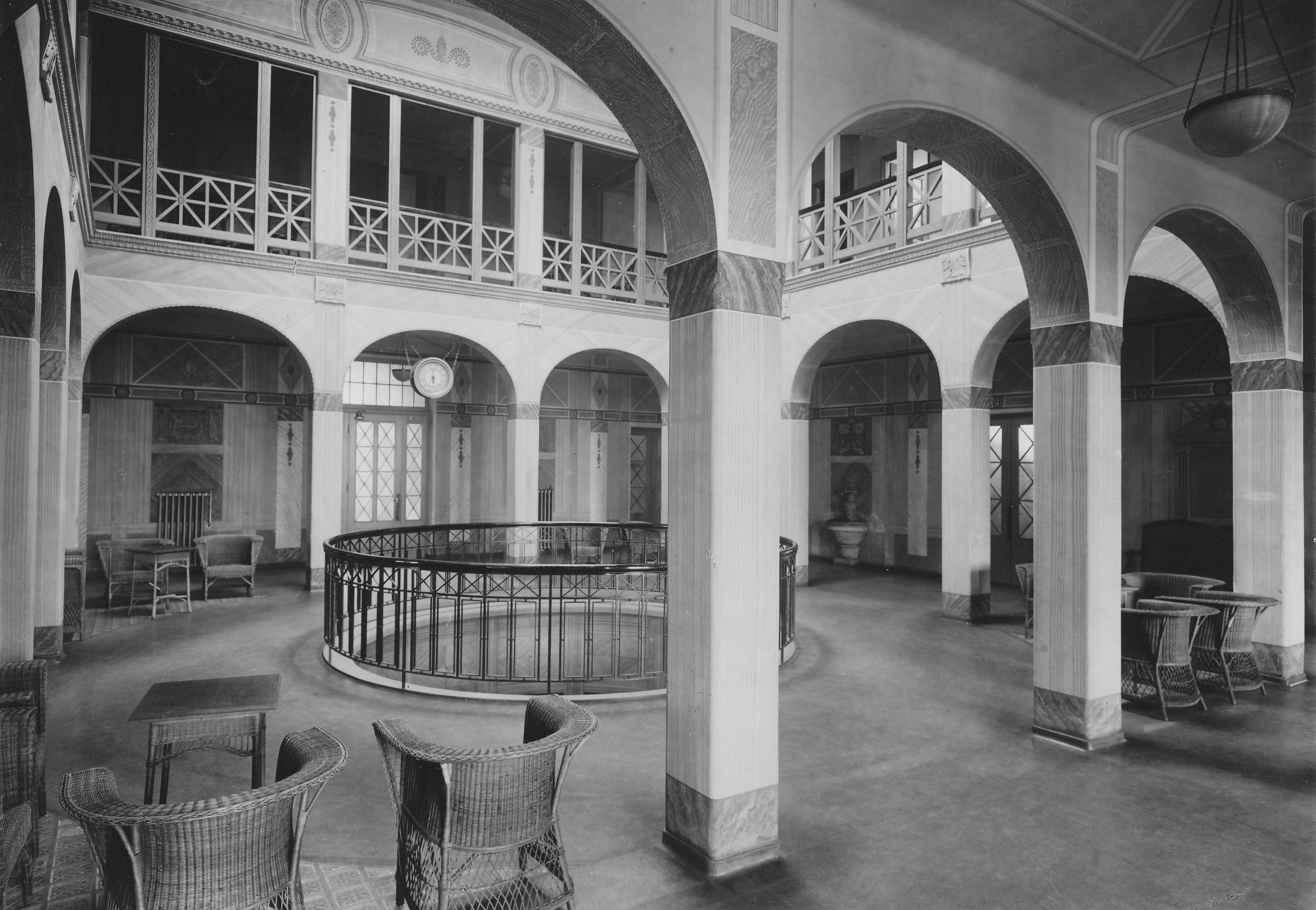 Die Wandelhalle im Inneren des Medico Palais (früher: Burgberg-Inhalatorium)